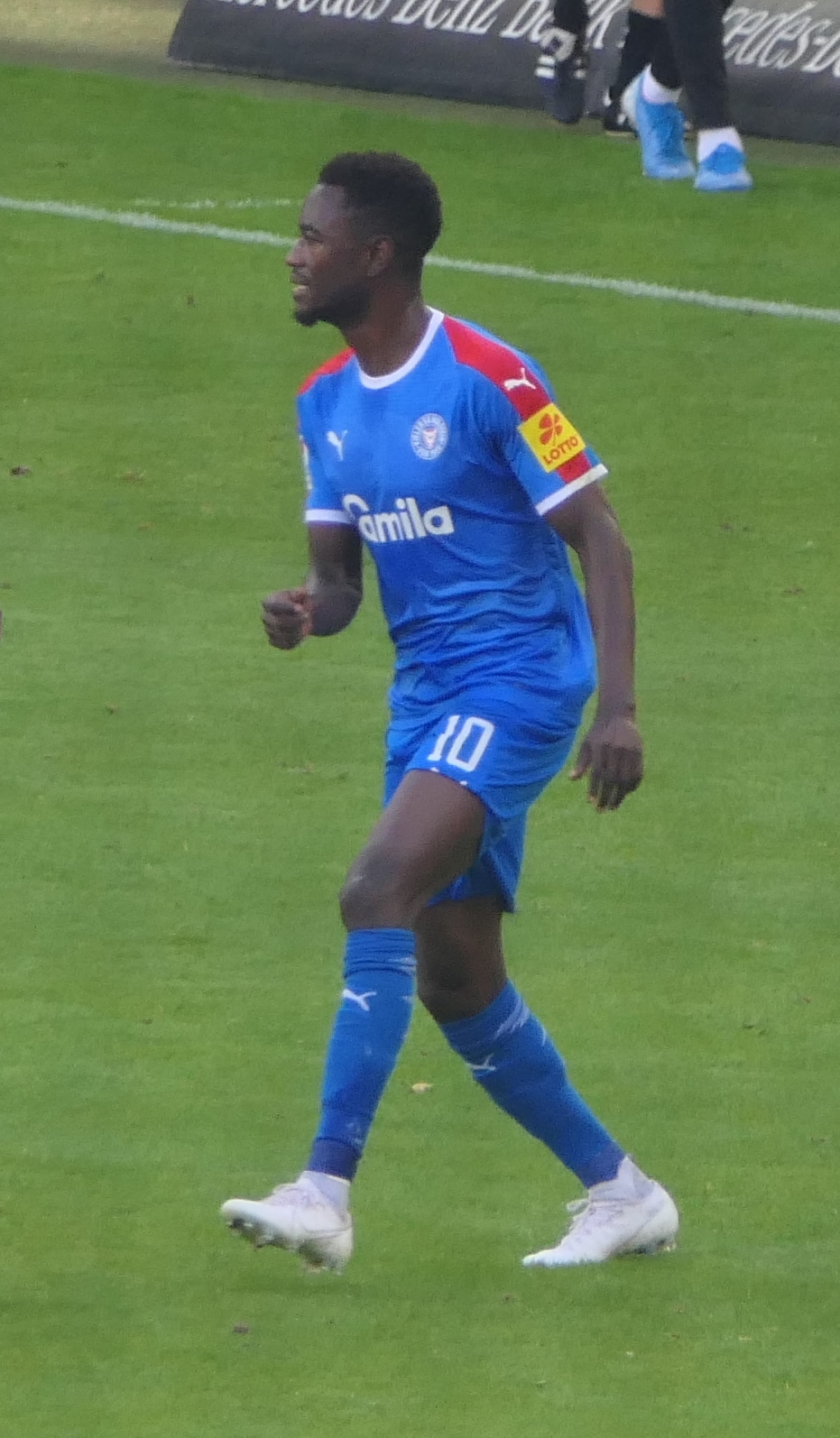 Der Fussballprofi David Atanga im Trikot von Holstein Kiel beim Auswärtsspiel gegen den VfB Stuttgart am 20.10.2019.